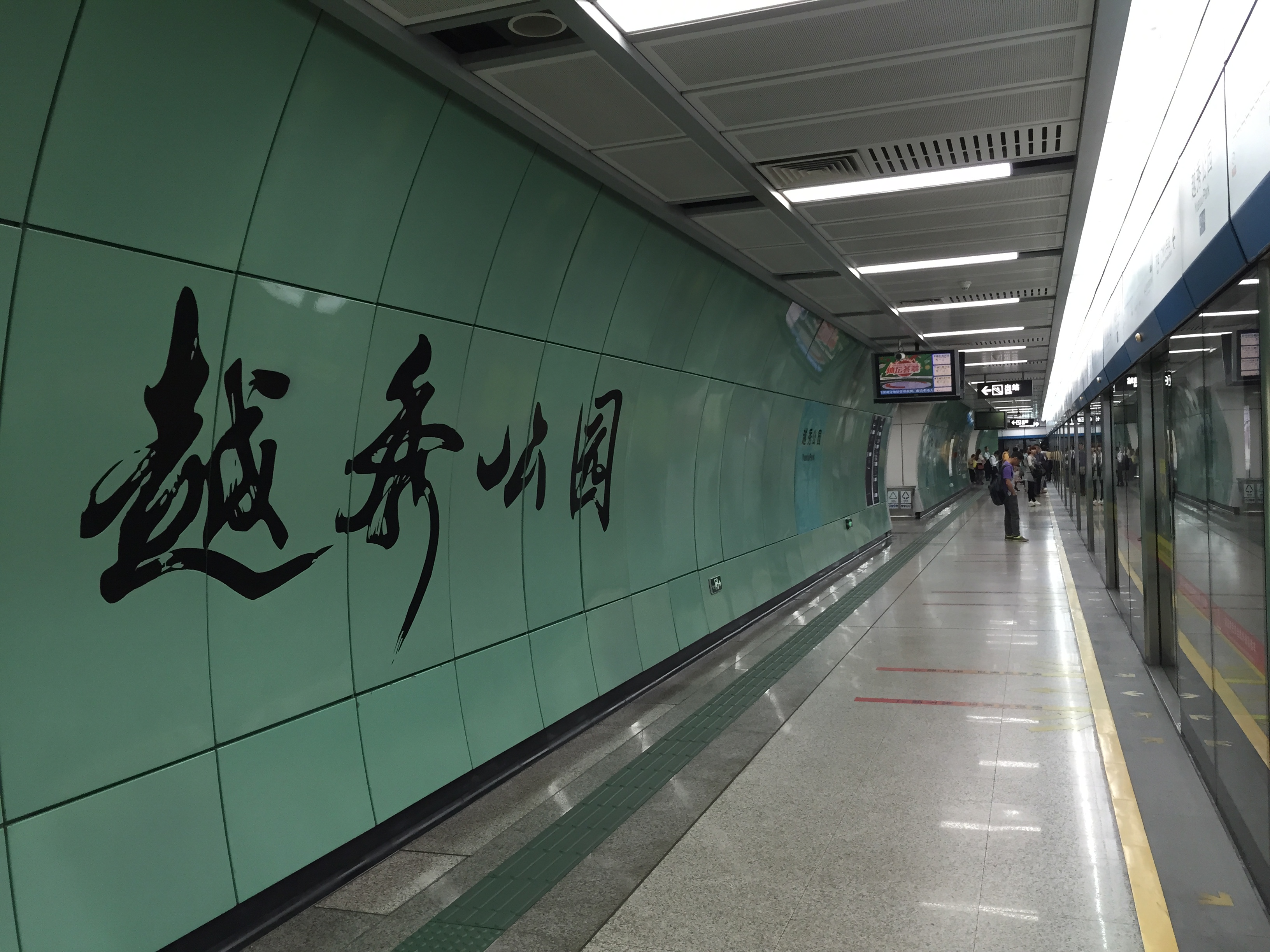 广州地铁越秀公园站